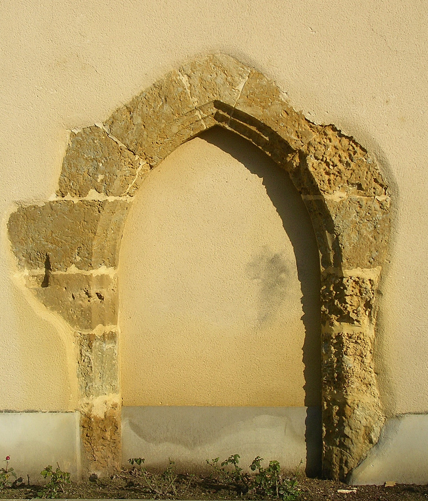 Eglise Saint-Jean-Baptiste de Bahus-Soubiran, dans le département français des Landes. Ancienne porte des cagots